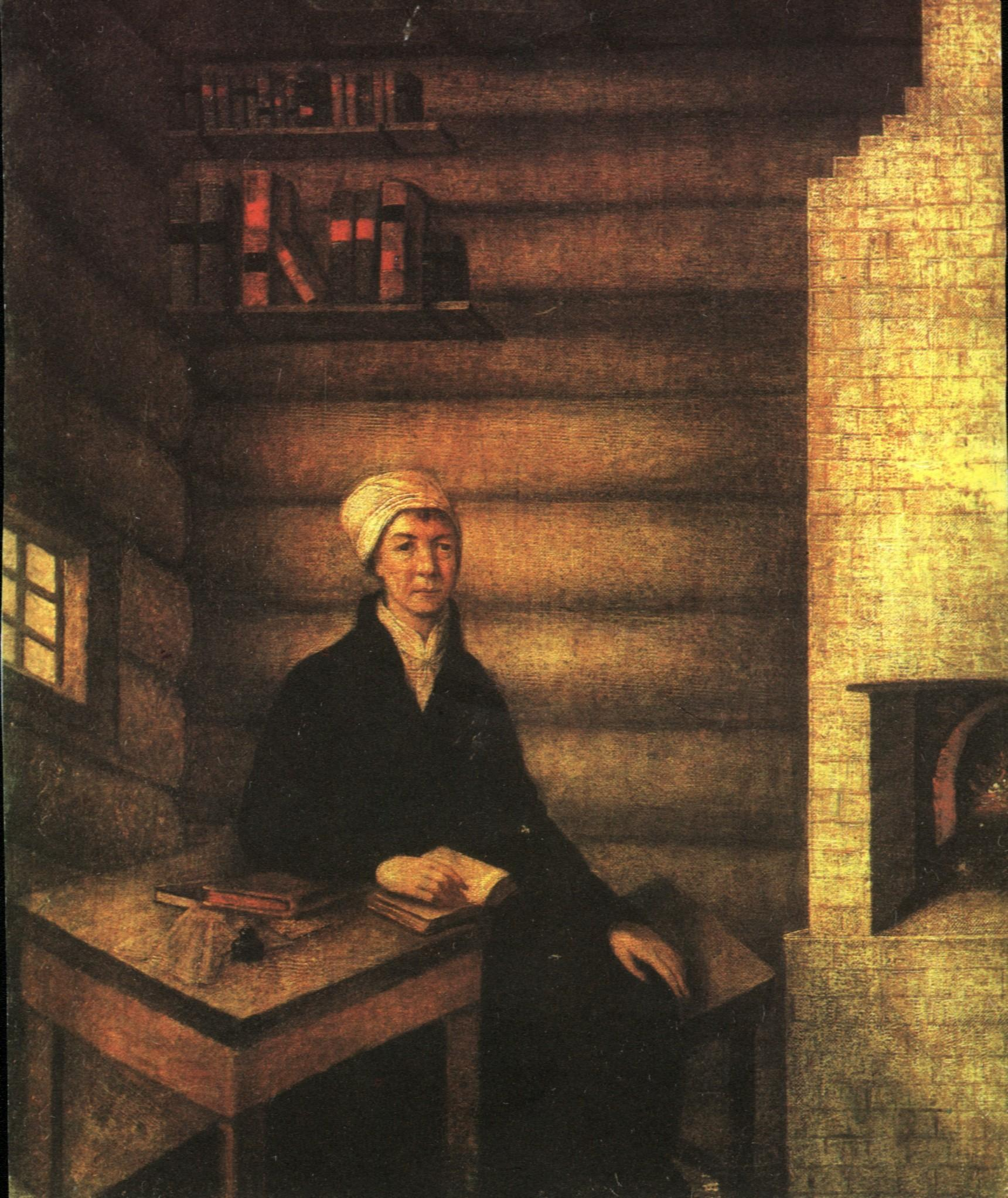 С живописного оригинала Сальватора (Николая Ивановича) Тончи 1796 г Портрет («Дашкова в ссылке»). X., м. 109 х 89 (Москва, Государственный музей А.С. Пушкина. Поступил из Дмитровского краеведческого музея. Ранее в собрании Апраксиных в имении Ольгово Дмитровского у. Московской губ.). →“Существуют и живописные копии с портрета итальянского художника. Две наиболее ранние в своей статье описывает Юрий Радченко, сообщая, что один вариант, полностью повторяющий авторскую хранится в Калужском областном художественном музее, а другой, представляющий собой фрагмент центрального полотна Тончи - в Государственном музее А.С. Пушкина в Москве, причем последний имеет на обороте надпись, свидетельствующую о том, что он был подарен Анне Петровне Исленьевой (1770-1847) в 1807 году, еще при жизни самой Е.Р. Дашковой [4б с. 238]” [1] [2]